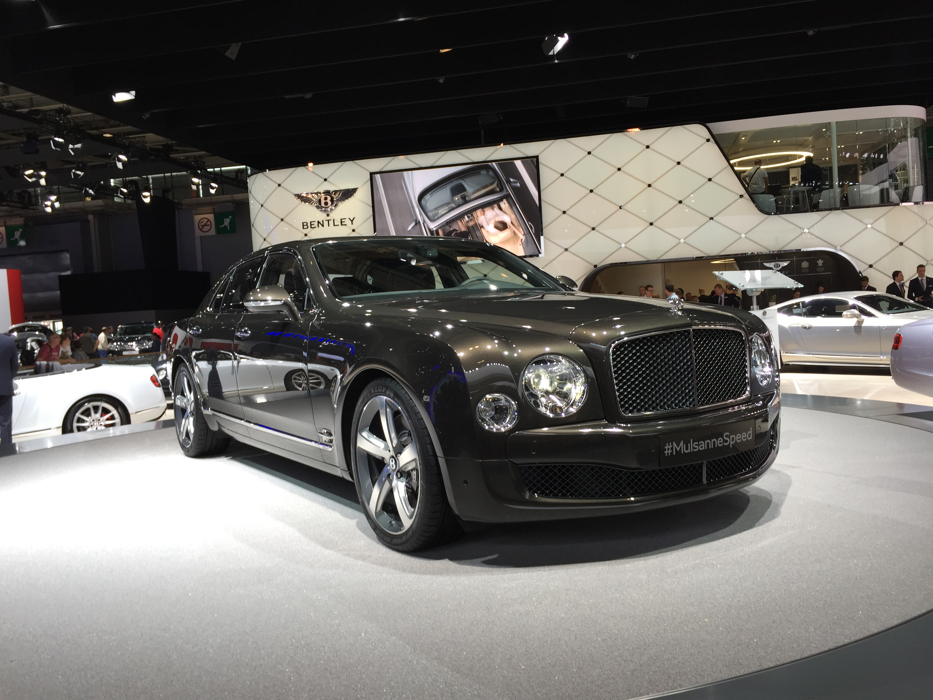 Bentley MULSANNE SPEED au Mondial de l’Automobile de Paris 2014